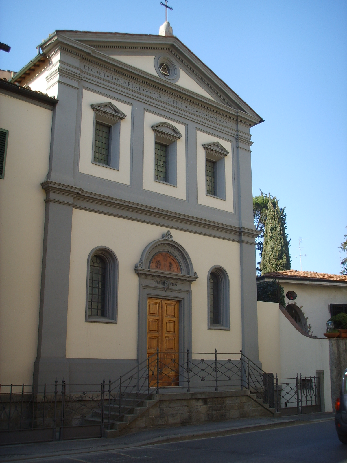 Chiesa dell'istituto delle suore serve di maria santissima addolorata